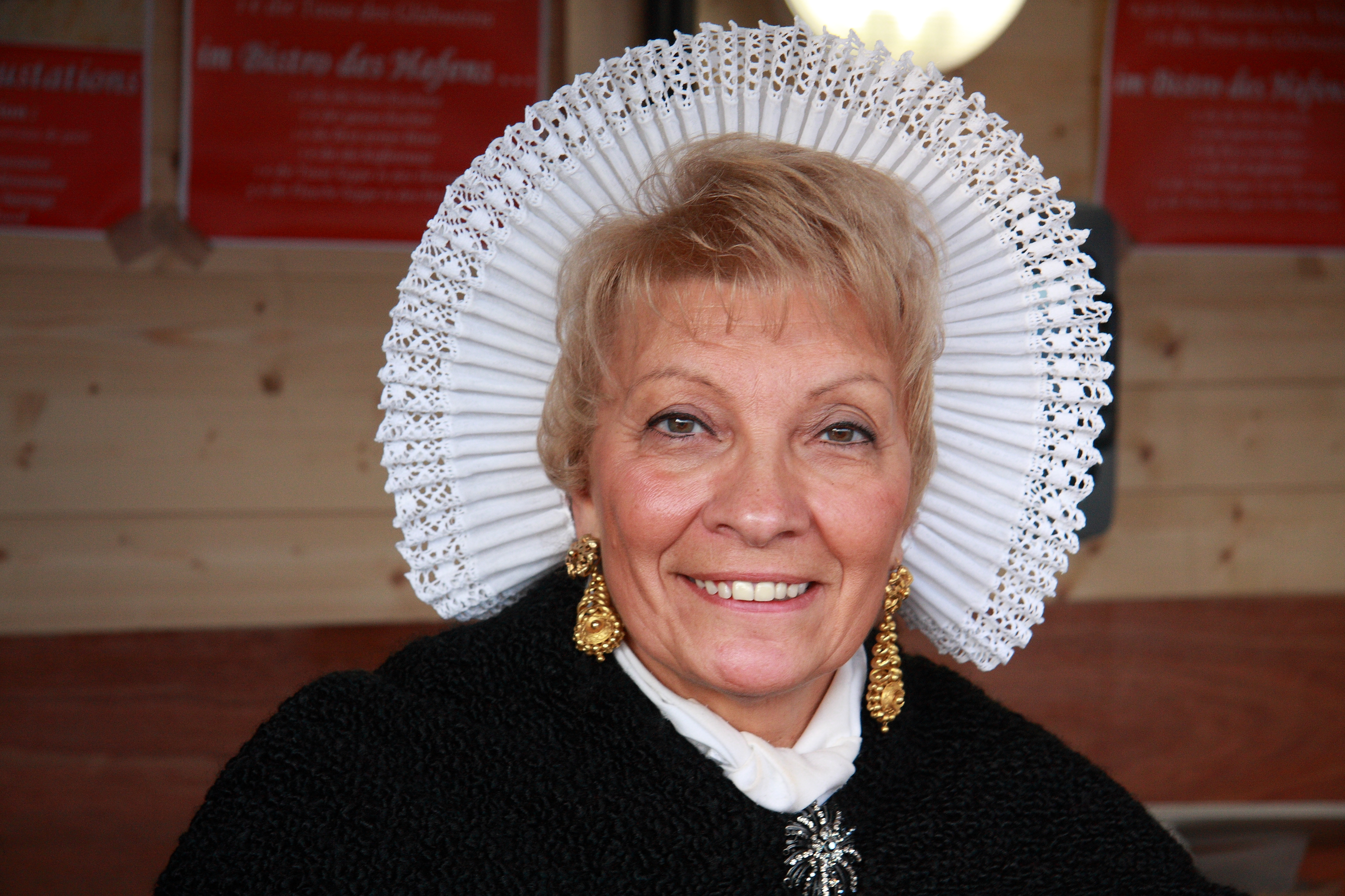 Une Etaploise avec sa coiffe traditionnelle